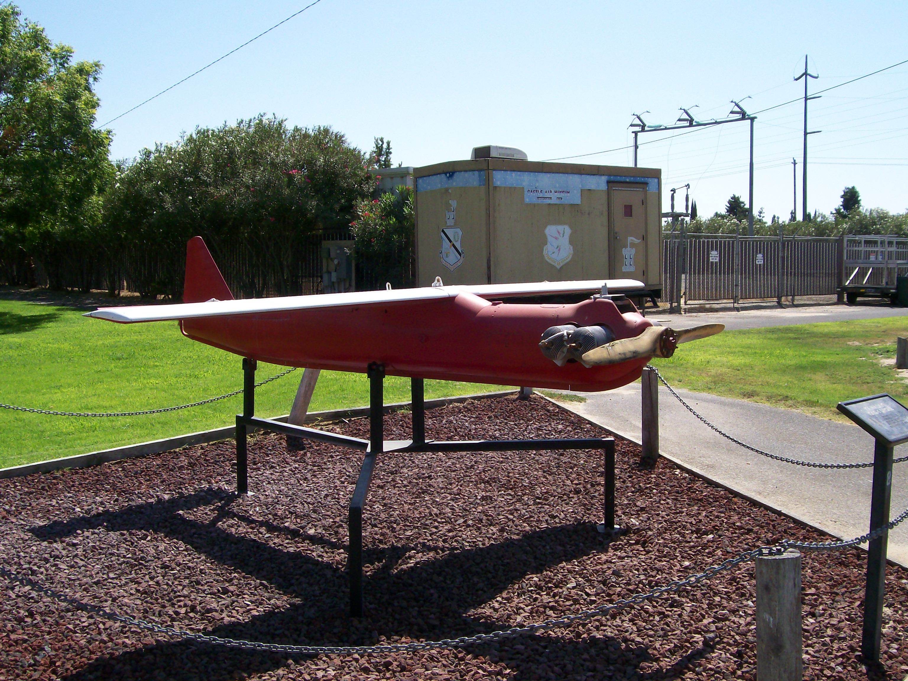 Kawasaki KAQ-1 Drone at Castle Air Museum